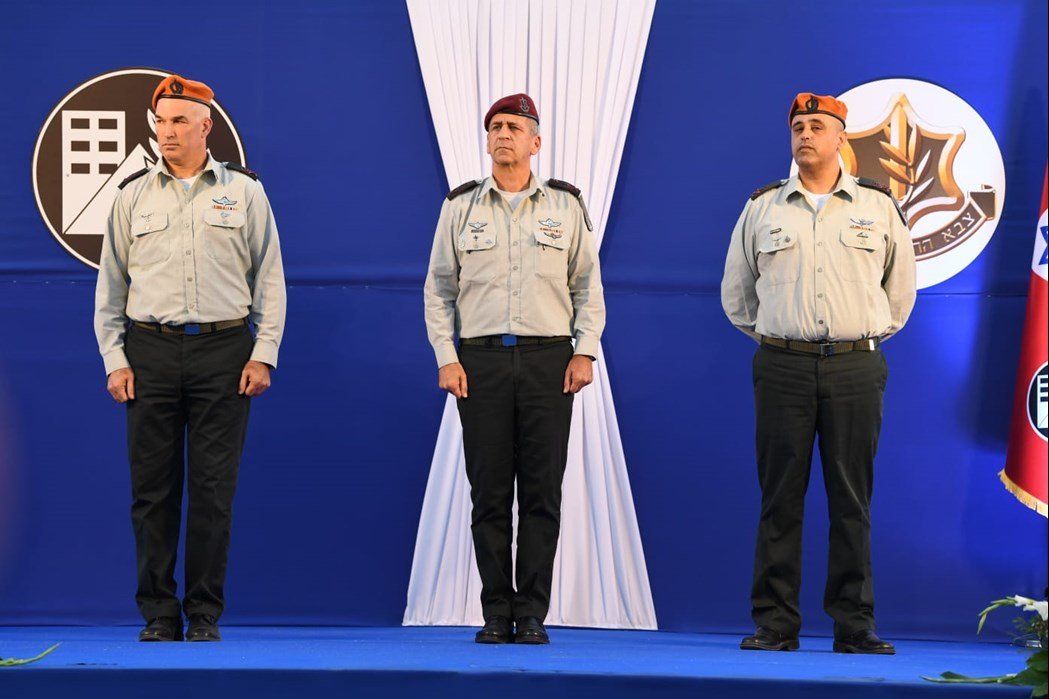 טקס חילופי מפקד פיקוד העורף.